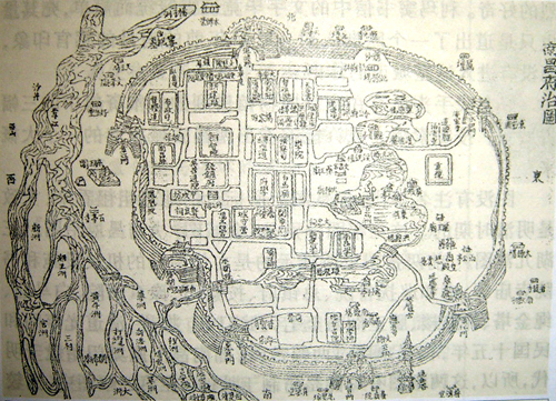 贛語: 南昌府治圖